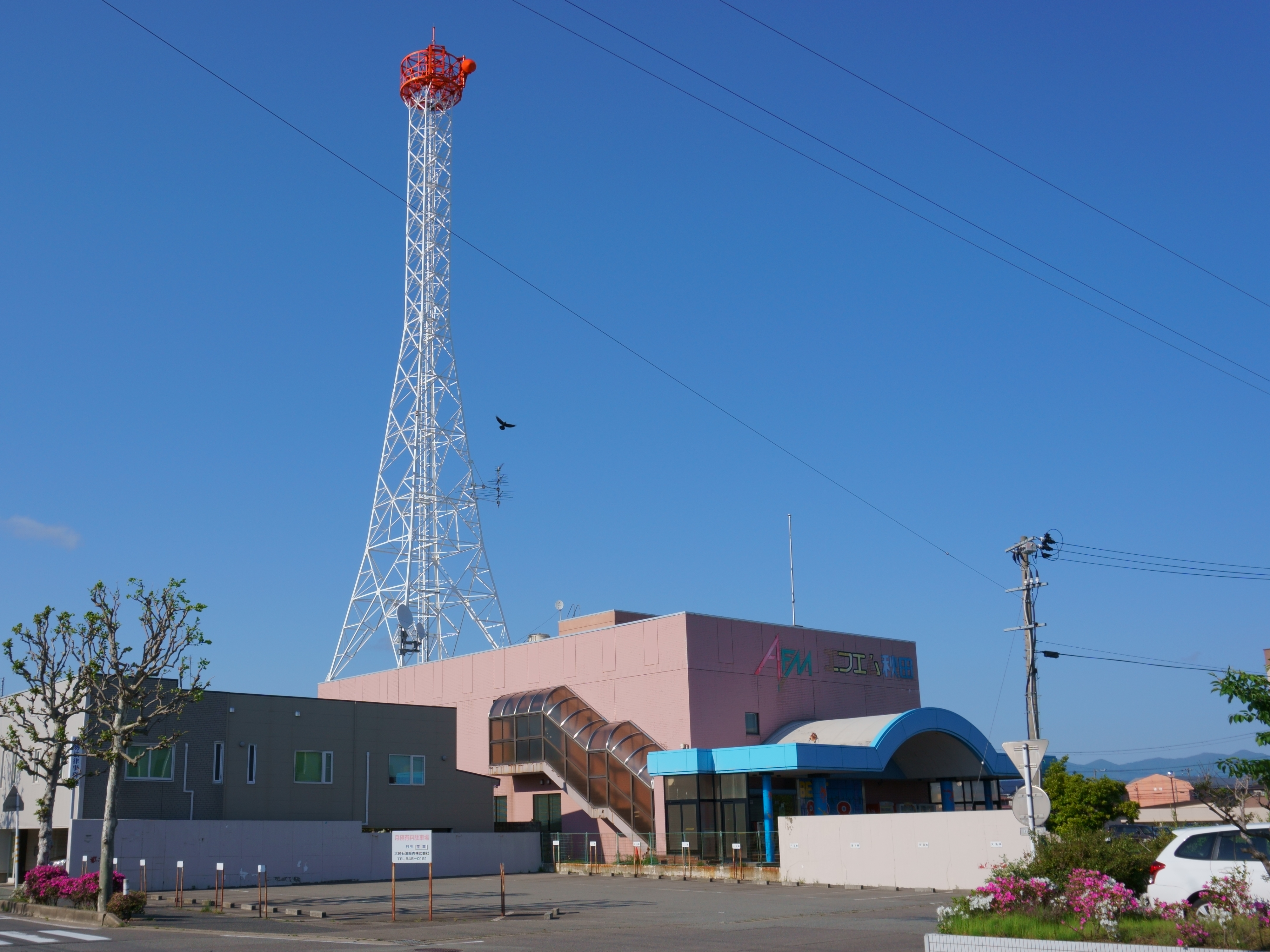 エフエム秋田本社 （秋田市八橋本町）